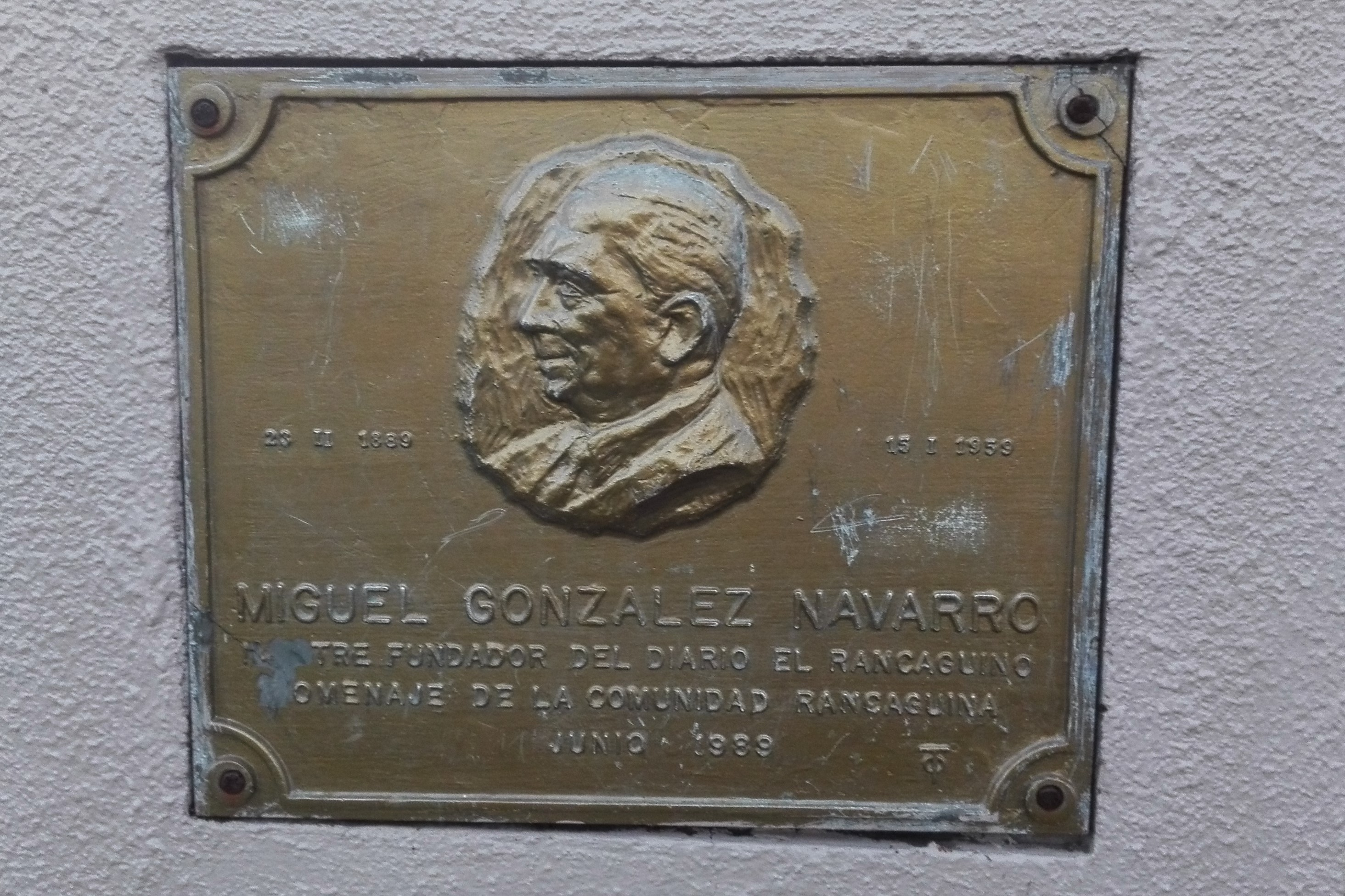 Placa en homenaje al periodista chileno Miguel González Navarro, en Rancagua.